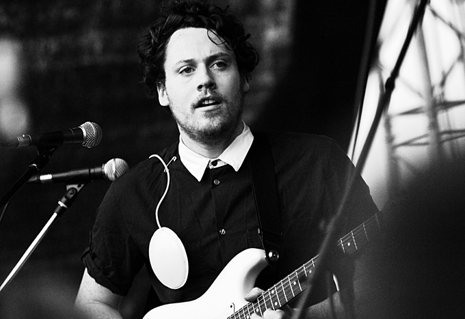 Пикник Афиши 2010